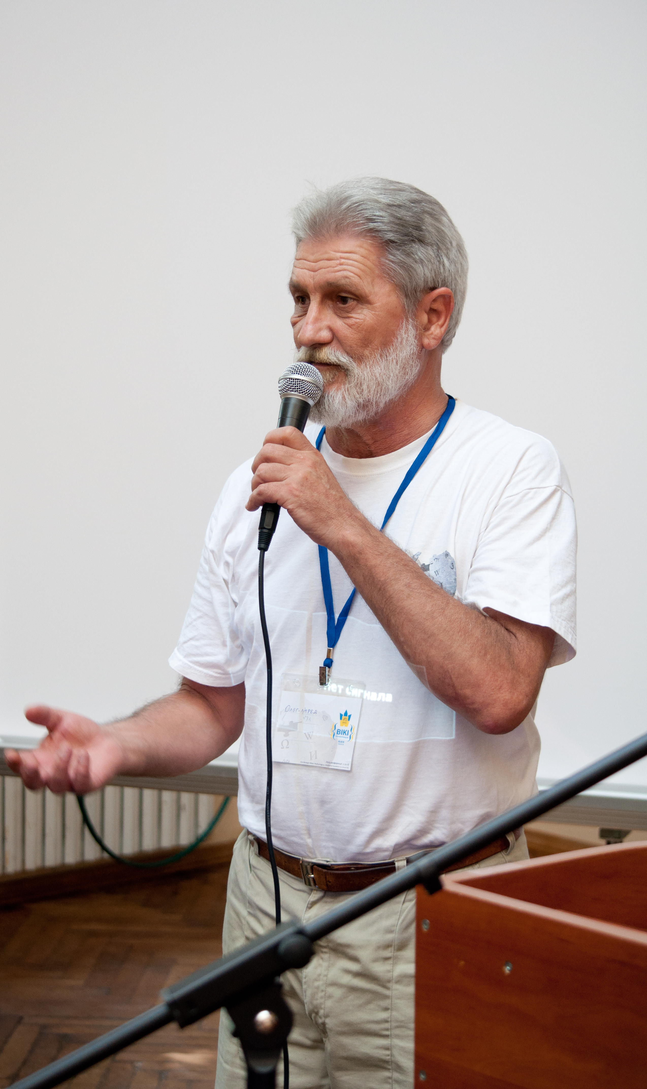 Вікіконференція_2015